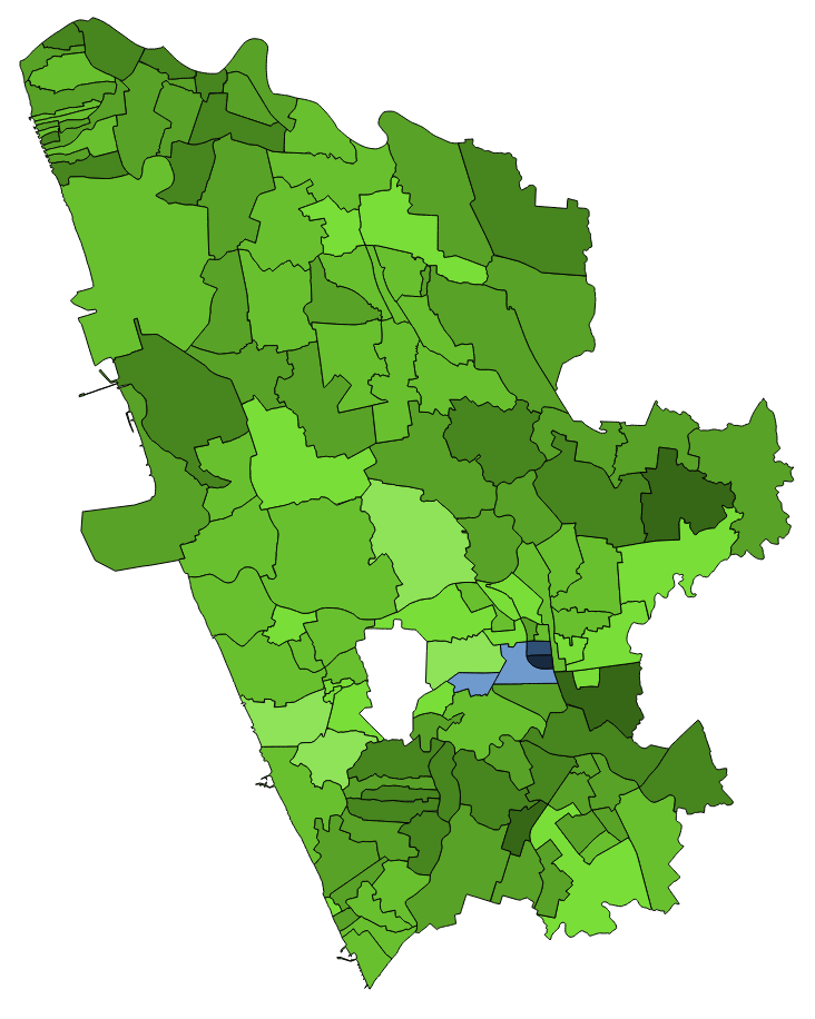 顏色對照表